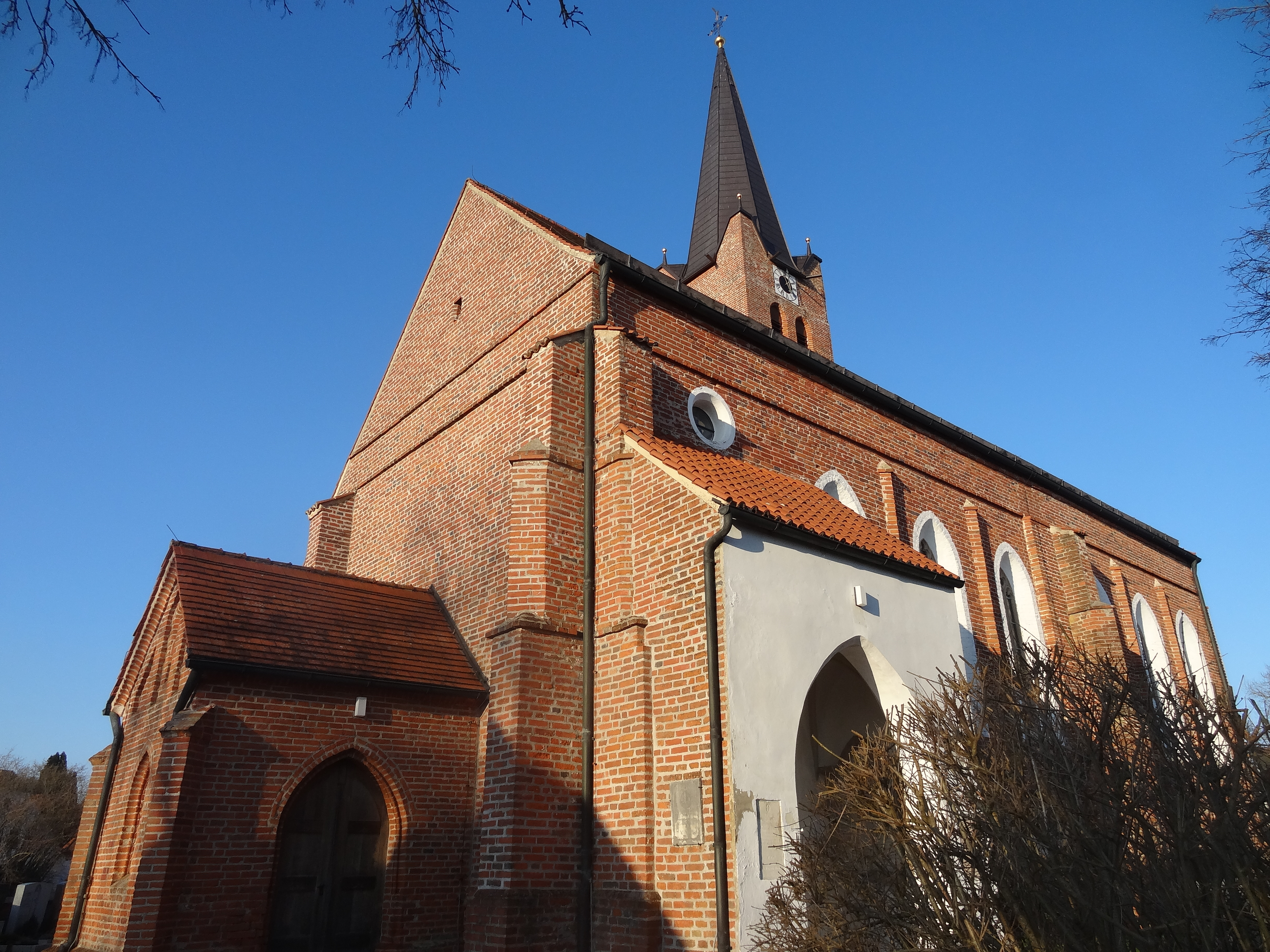 Außenansicht der Pfarrkirche St. Johann Baptist in Hohenegglkofen, Gde. Kumhausen, Lkr. Landshut